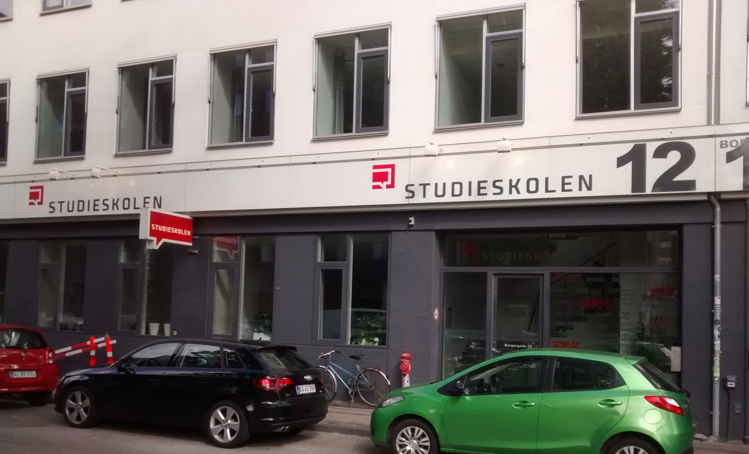 Studieskolen